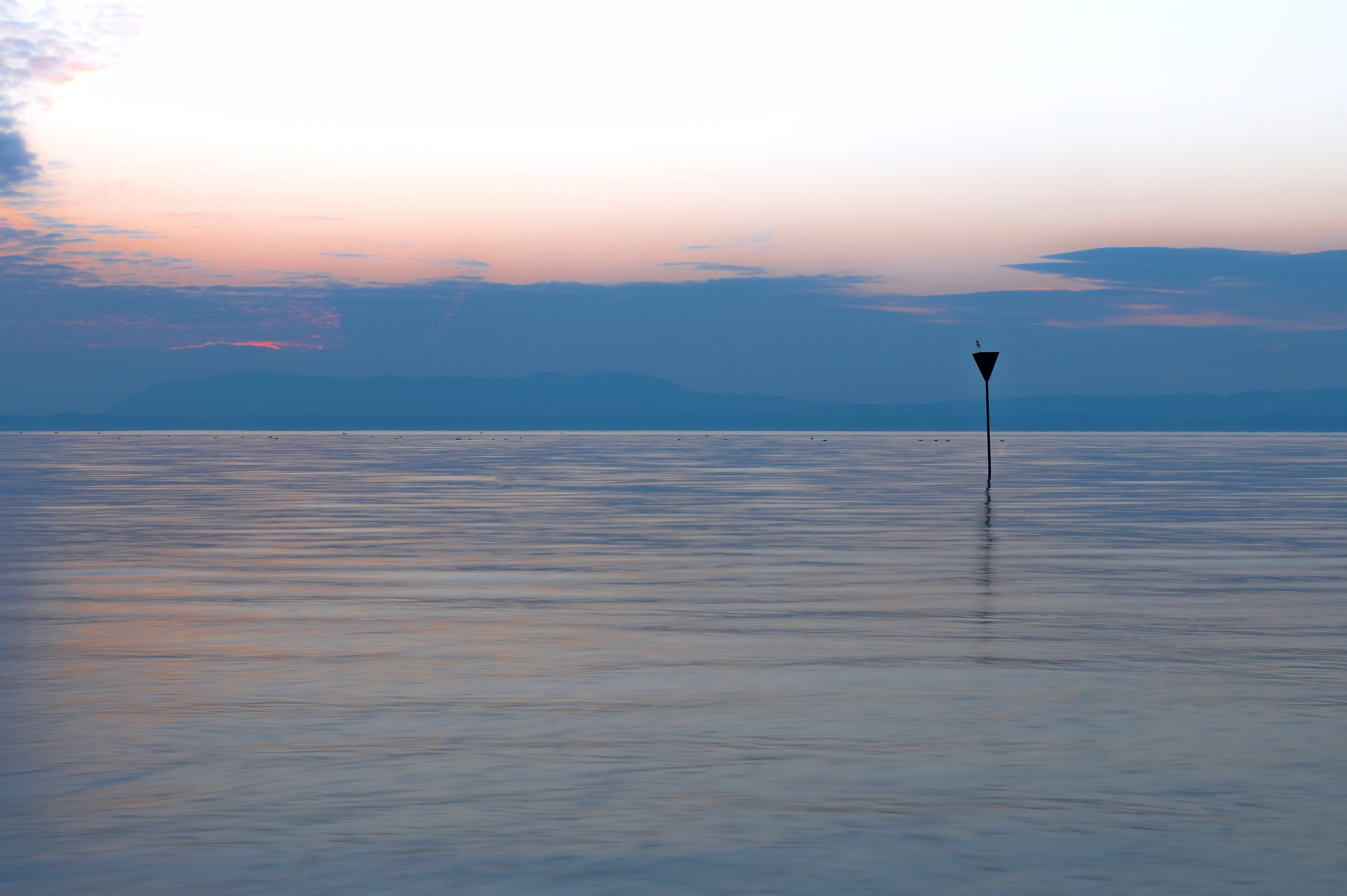 Hauterive, Laténium